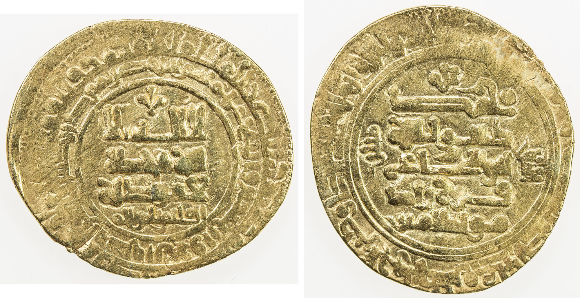 سکه یک دینار فرخ زاد غزنوی